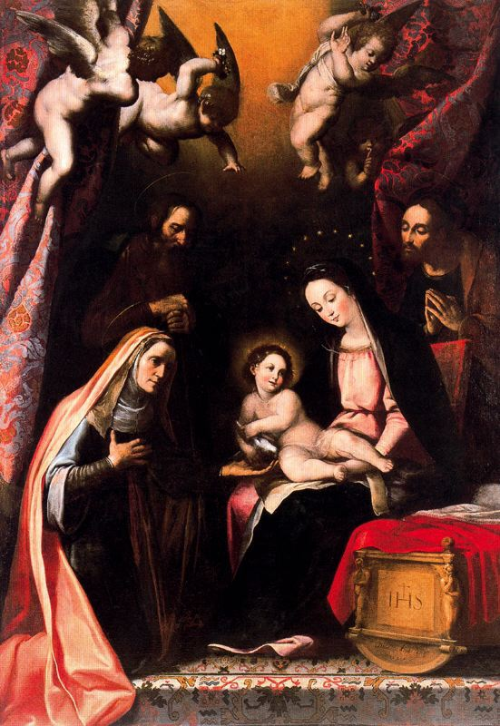 La obra representa a los tres miembros de la Sagrada Familia cristiana junto a San Joaquín y a Santa Ana, los padres de la Virgen María.